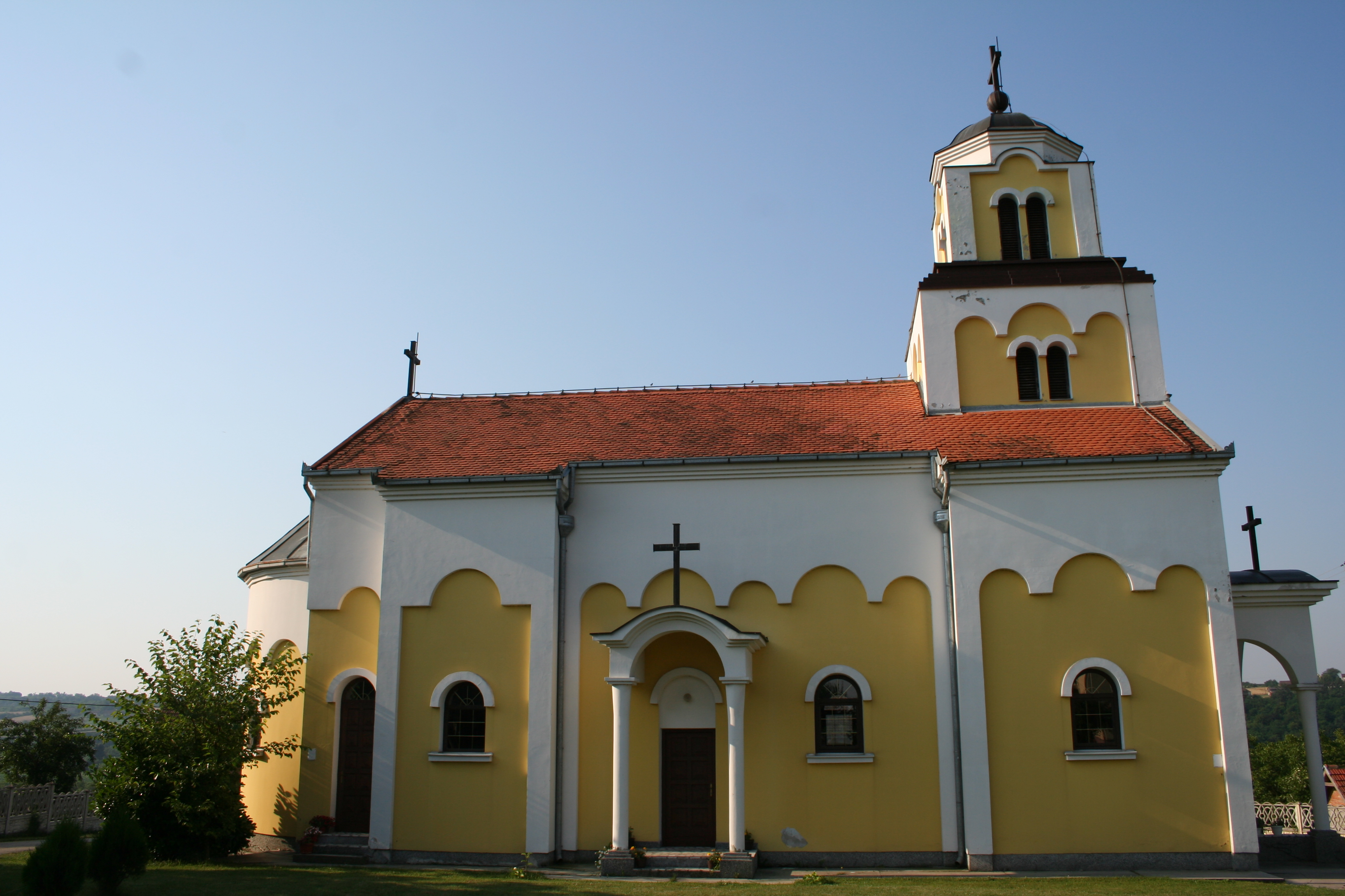 Crkva Sv. Georgija, Pocerski Metković